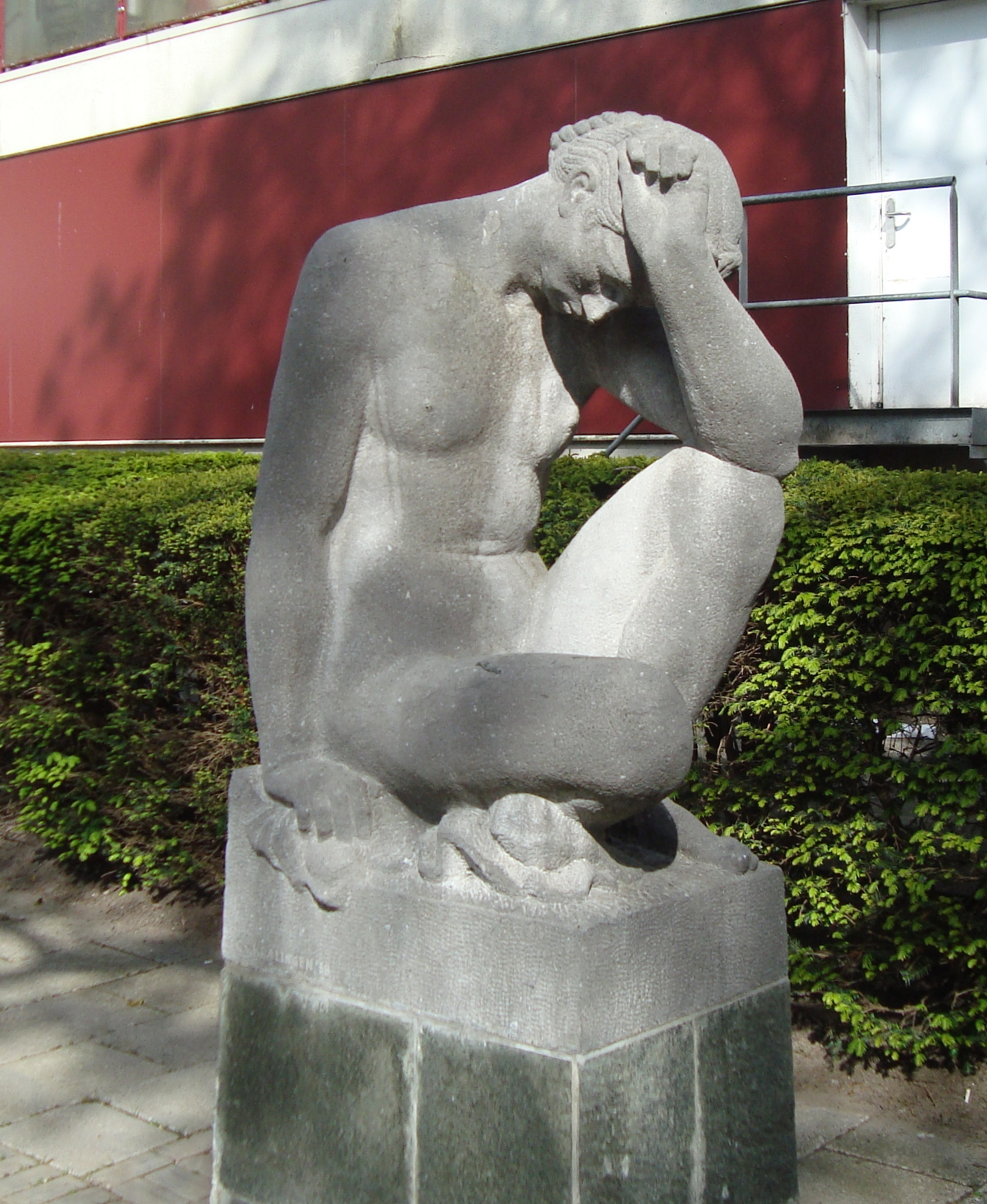 Rotterdam Zuidplein, Goereesestraat. Kunstwerk "Treurende vrouw" van Cor van Kralingen. Rotterdam/The Netherlands. Het kunstwerk staat op de echte plaats van de gebeurtenis waarvoor ook is vervaardigd.